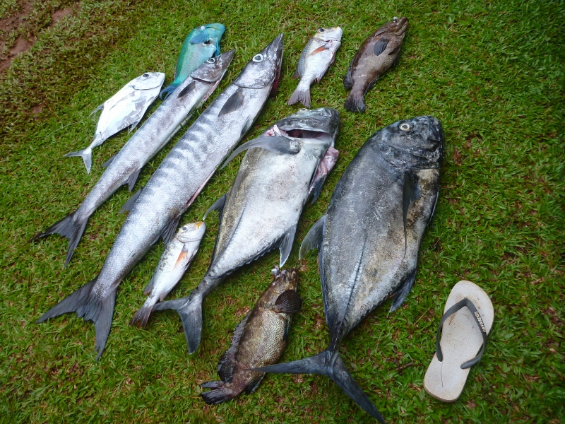 Retour de pêche : différents poissons pêchés à Wallis (Wallis et Futuna) Wallis-et-Futuna